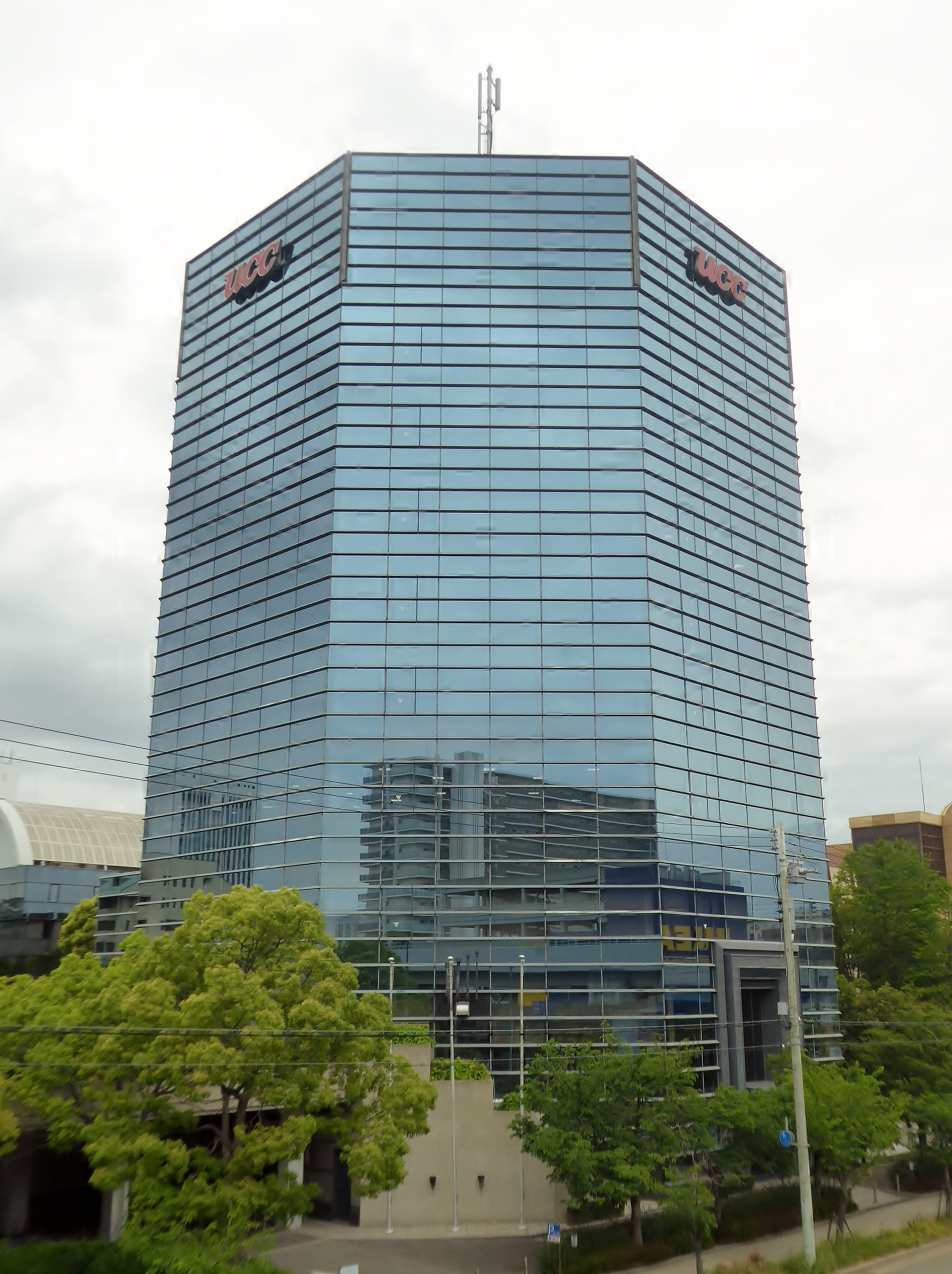 ユーシーシーホールディングス株式会社本社を撮影。 Panasonic Lumix DMC-TZ60